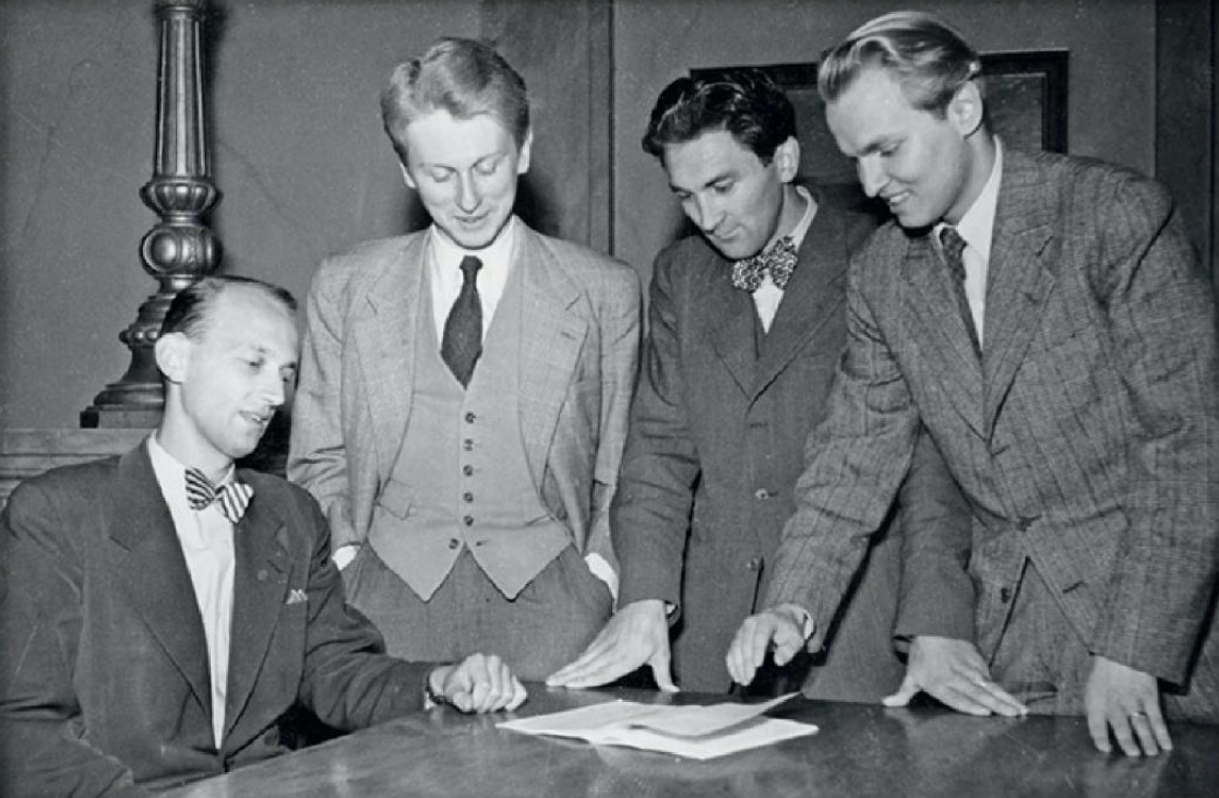 Studentdebatt i Uppsala 1952. Från vänster Håkan Berg (folkpartiet), Hans von Friesen (högerpartiet), Lennart Pettersson (bondeförbundet) och Assar Lindbeck (socialdemokraterna).